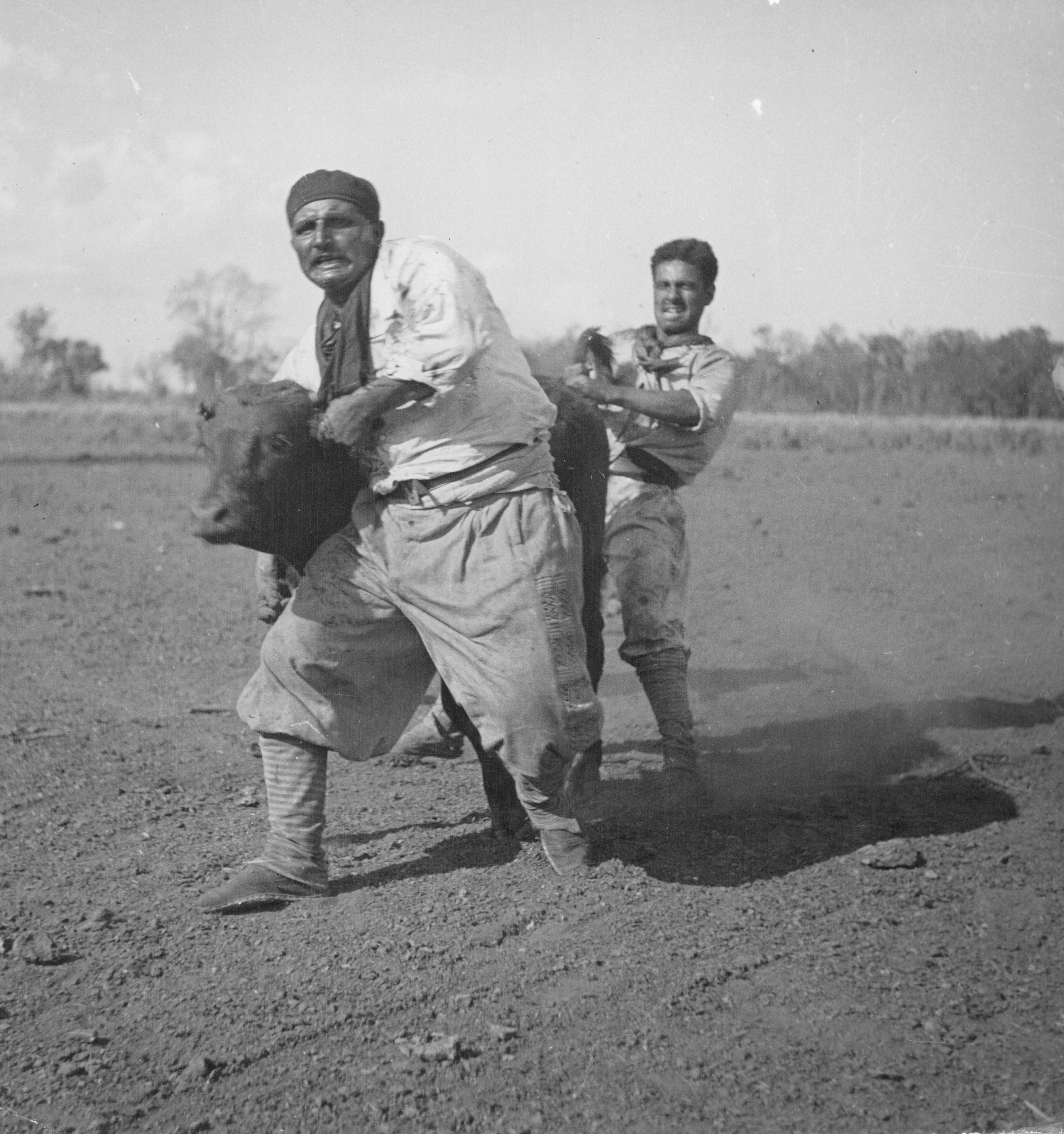 Yerra en la estancia Pereyra Iraola año 1937. Inventario 47159 General Archive of the Nation Native nameArchivo General de la Nación ArgentinaLocationBuenos Aires, ArgentinaCoordinates34° 36′ 17″ S, 58° 22′ 14″ W Established28 August 1821Web pageAGNAuthority control : Q2860529 ISNI: 0000 0001 2375 5869 LCCN: n82144709 WorldCat institution QS:P195,Q2860529 This file, was provided to Wikimedia Commonsthanks to an agreement between the General Archive of the Nation of Argentina and Wikimedia Argentina.